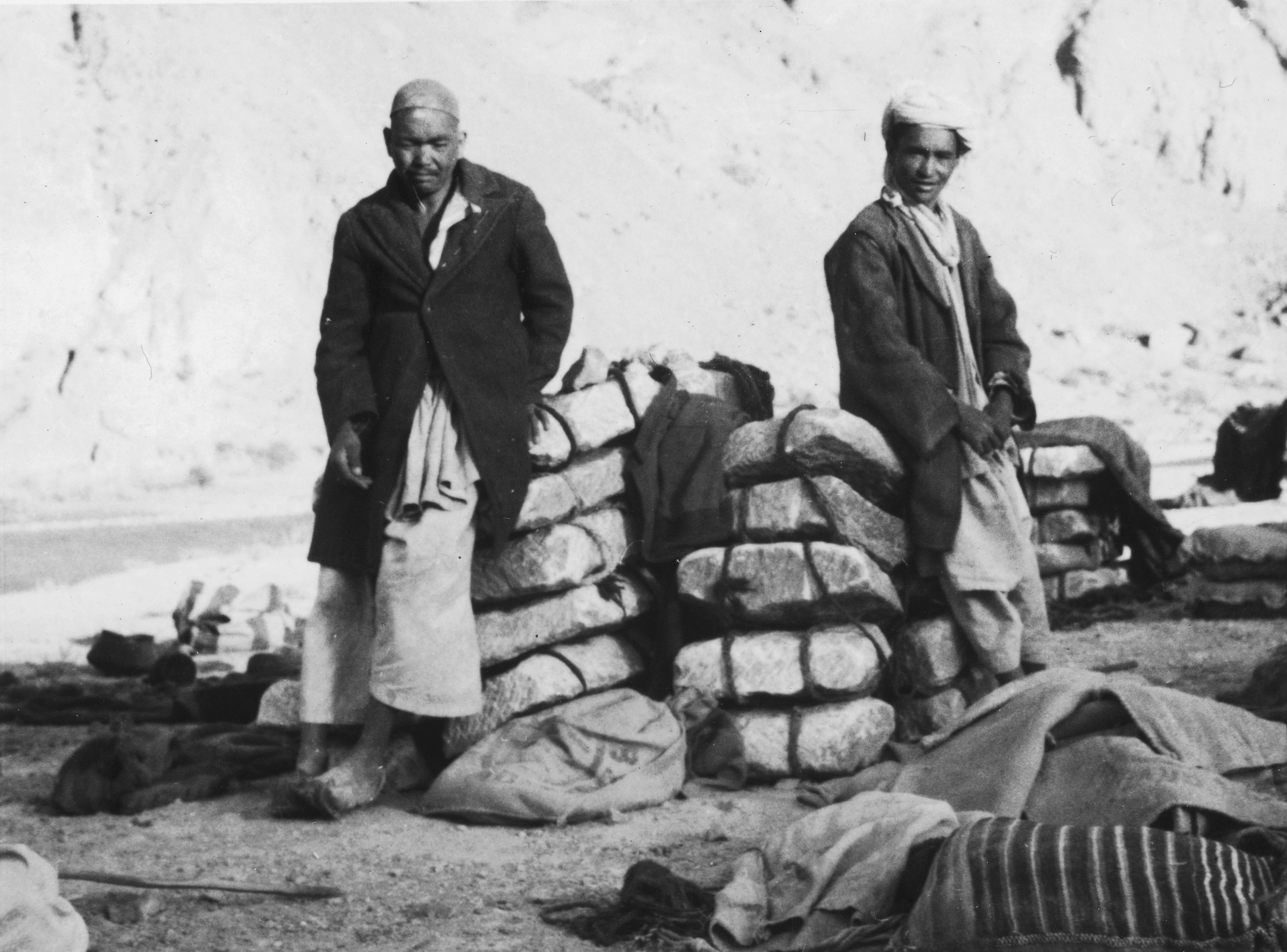 Afghanistan, Bamiyan, Bamyan (Bamian): Menschen; Sitzende Männer auf gestapelten Salzplatten